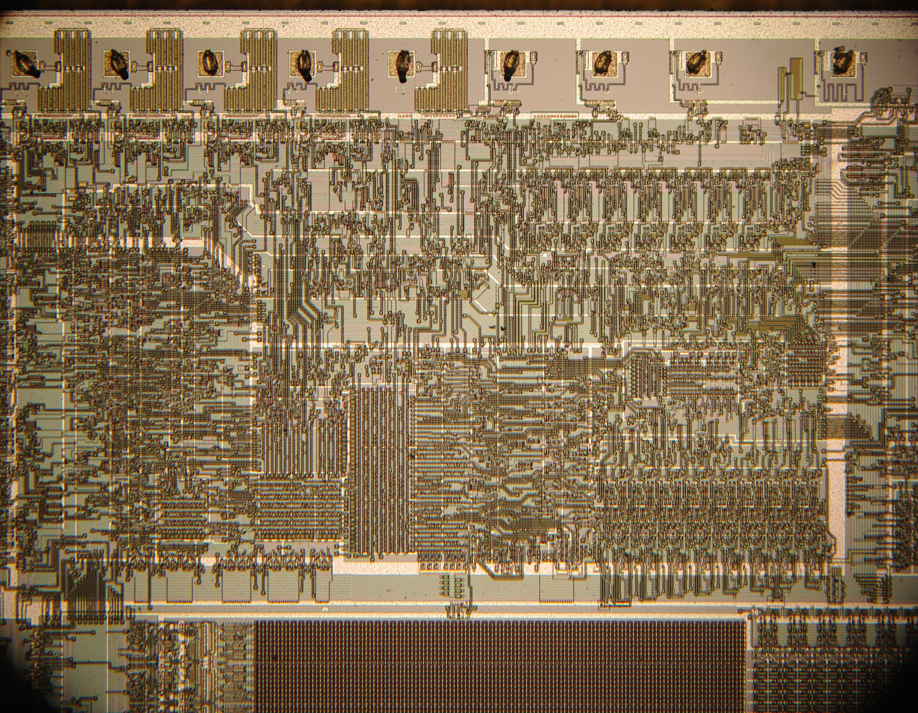 Microcontroller NEC 8741